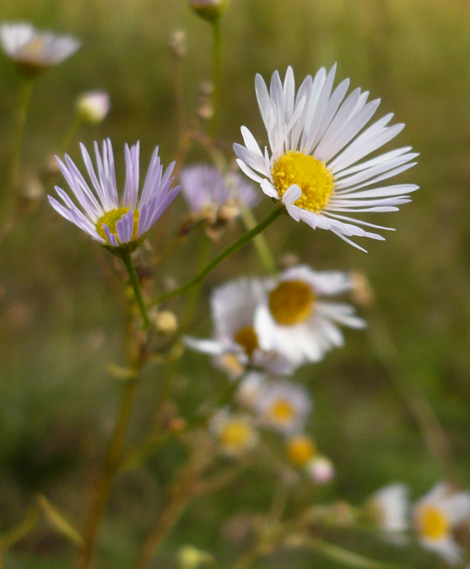 Астра ланцетная. Экопоселение Кореньские родники, Белгородская область.